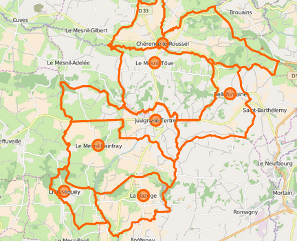 carte de la commune nouvelle et de ses communes déléguées